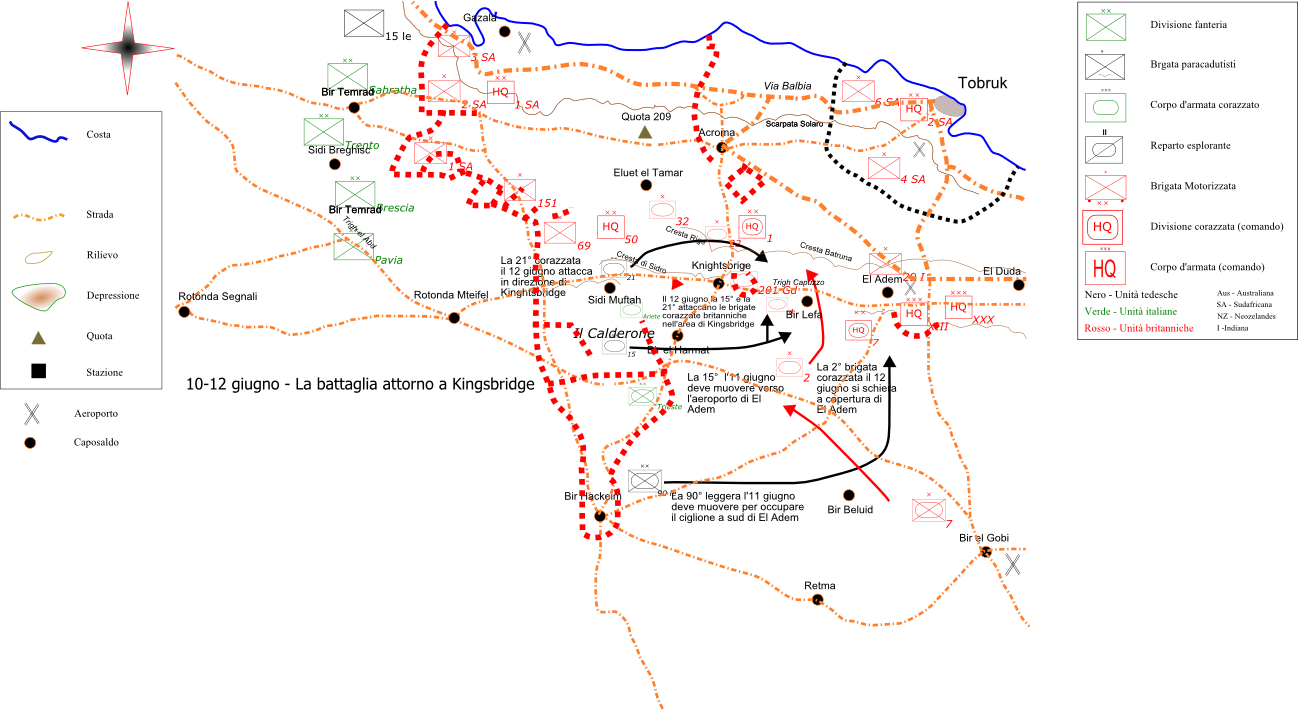 Eventi della battaglia di Ain el Gazala dal 10 al 12 giugno 1942